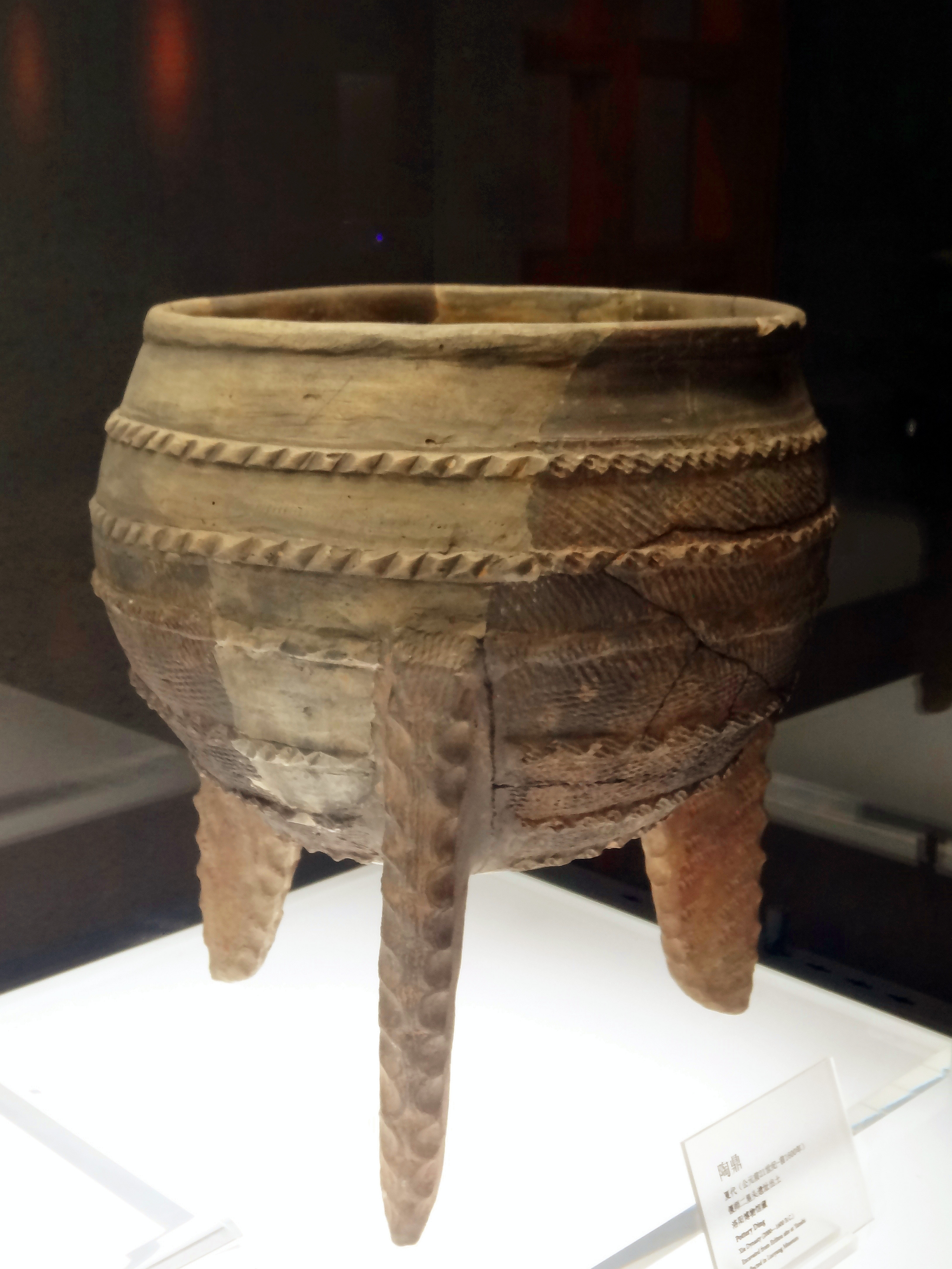 陶鼎，夏代，中国河南偃师二里头遗址出土。拍摄于河南博物馆